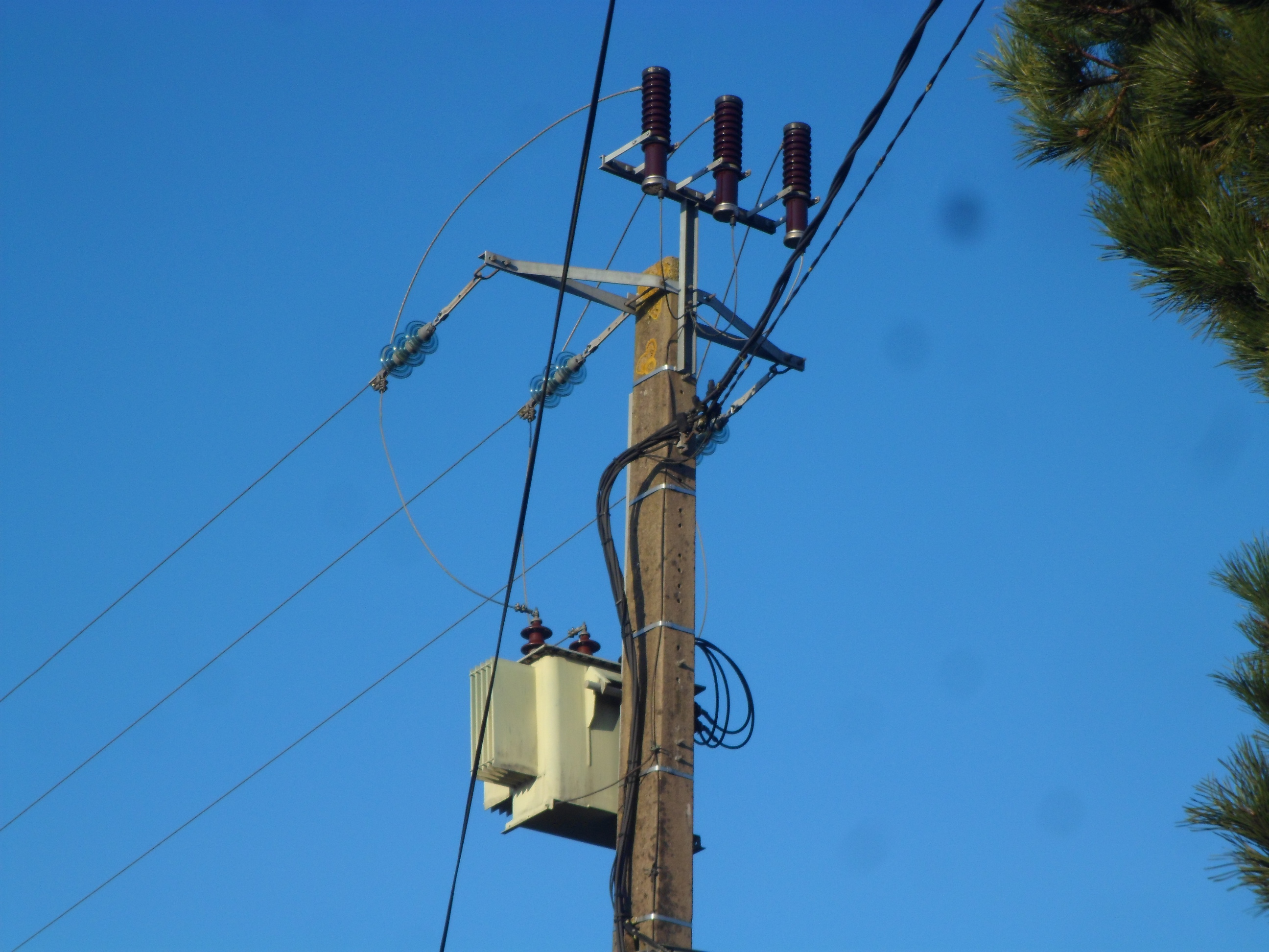 Photographie d'un poste haut de poteau à la Tabarière (85).